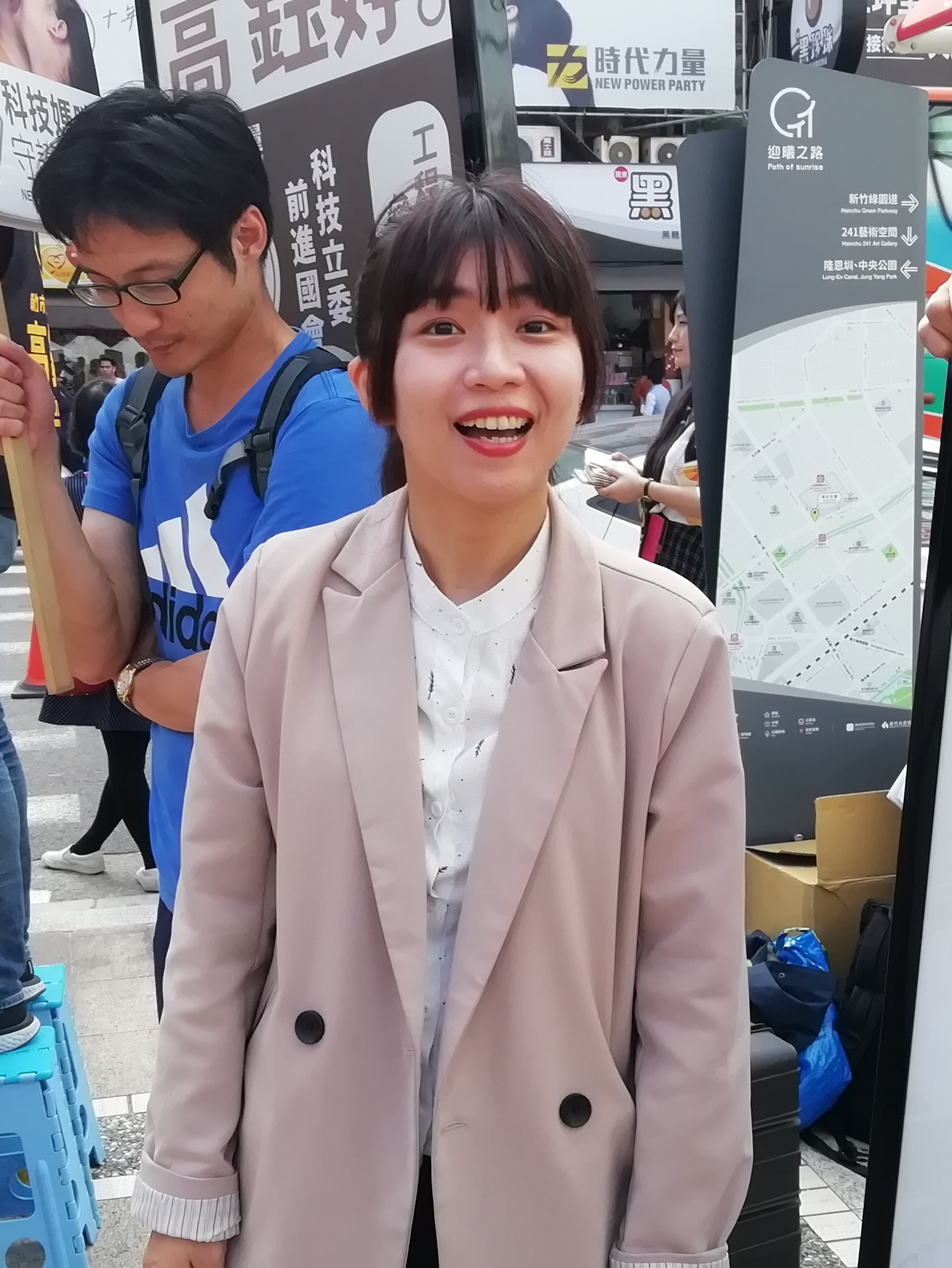 中文（台灣）: 林穎孟照片，參加新竹立法委員候選人高鈺婷的宣傳活動